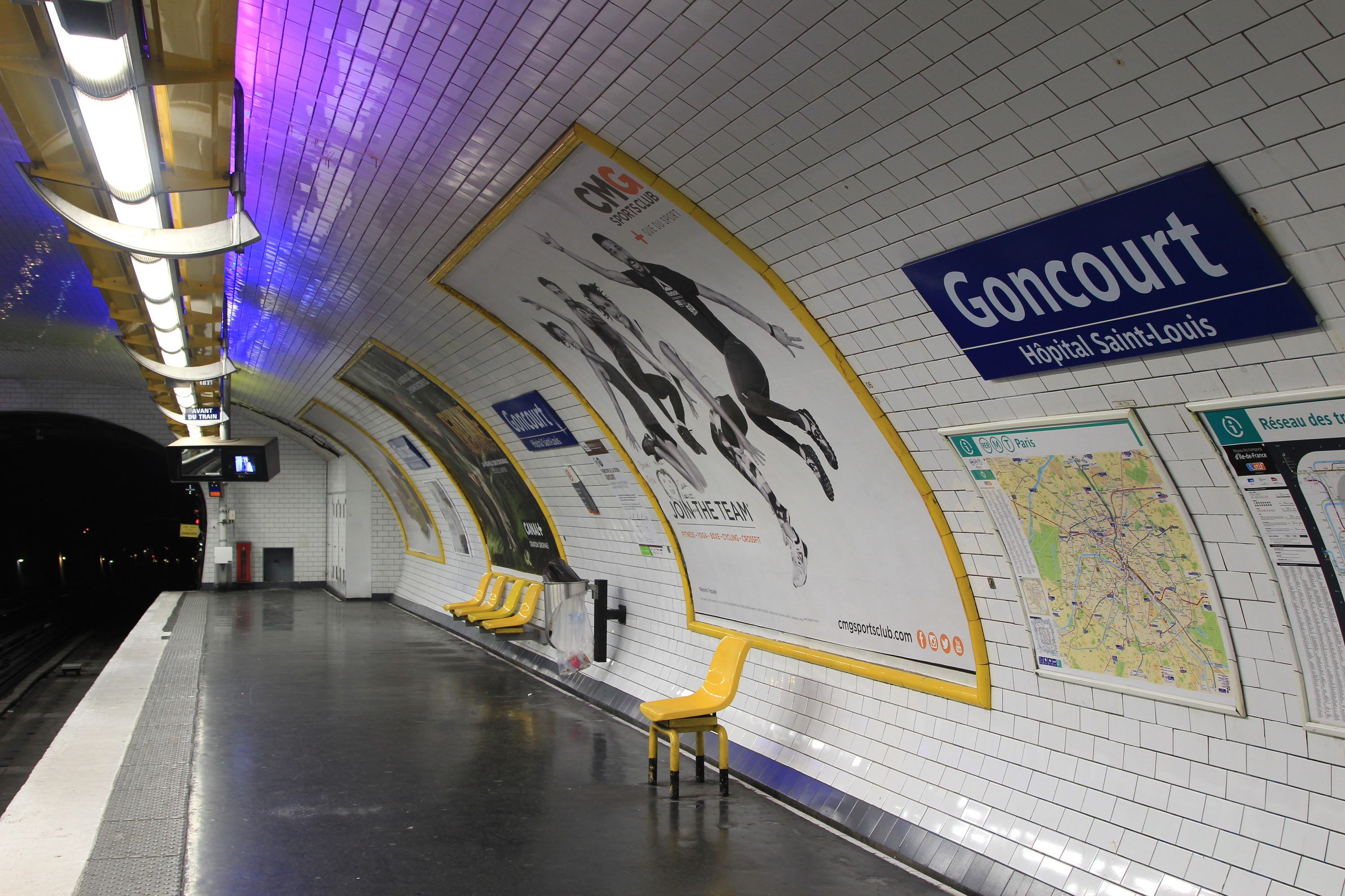 Quai en direction de Châtelet de la station de métro parisien Goncourt.